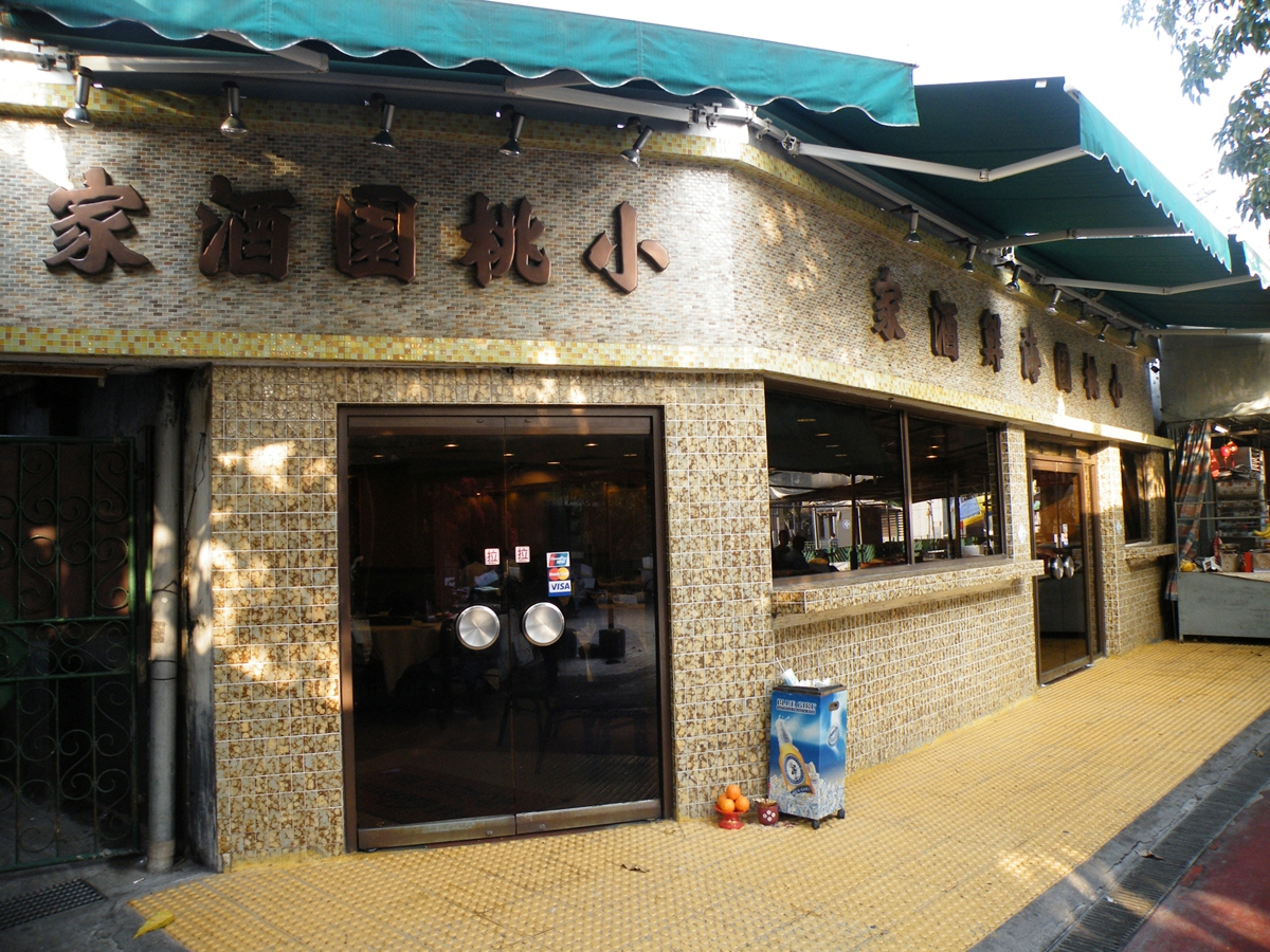 Siu Tao Yuen Restaurant, Lau Fau Shan